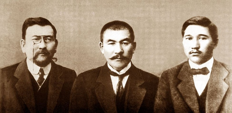 Отцы-основатели газеты «Казах» (слева направо) Ахмет. Байтурсынов, Алихан Букейханов и Миржакип Дулатулов в день выпуска первого номера газеты. Оренбург, 2 февраля 1913 года.